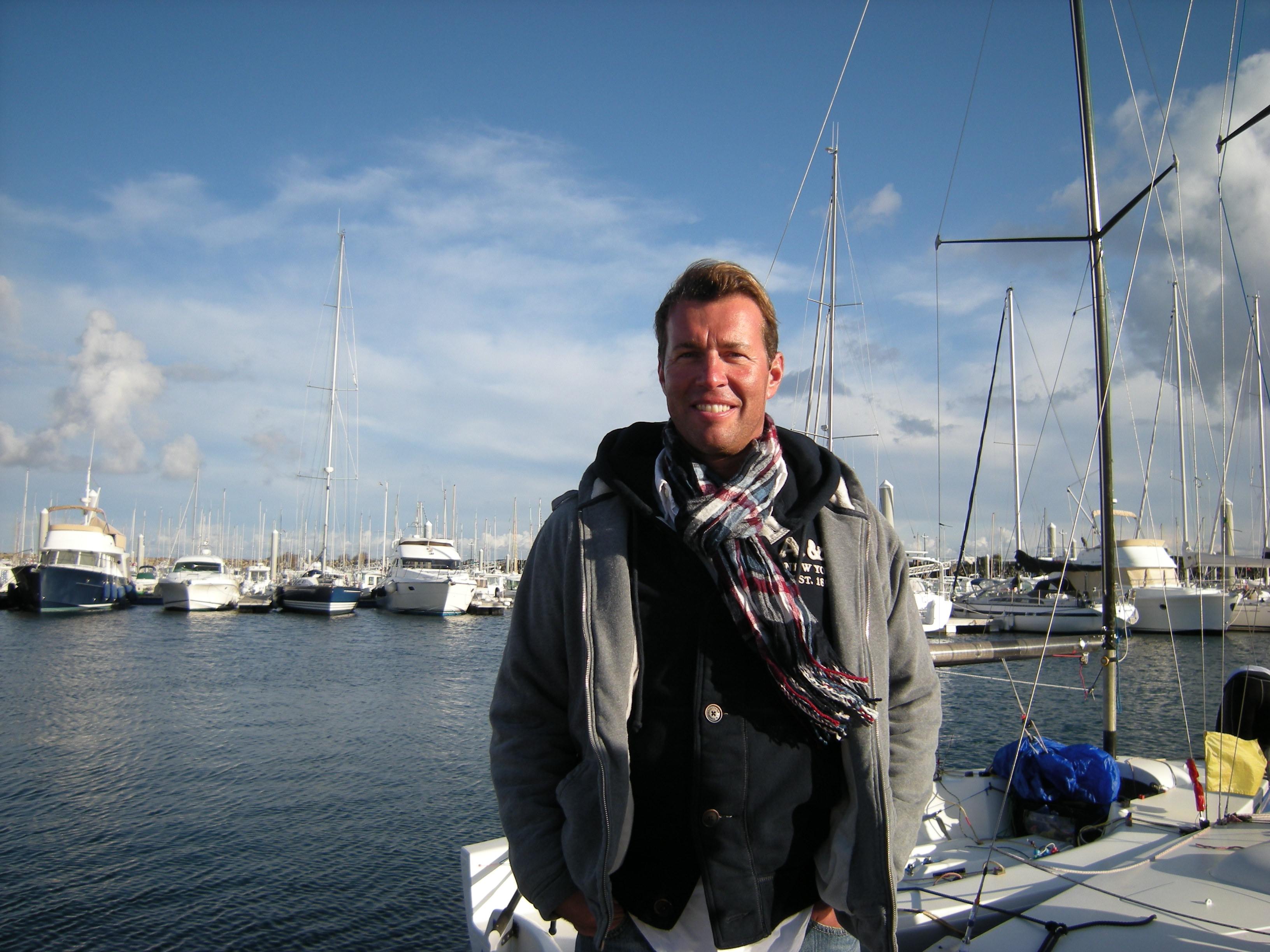 Pierre-Alexis Ponsot, équipier qualifié en Star pour l'équipe de France olympique des JO 2012, époux de Claire Leroy, à St-Quay 2012